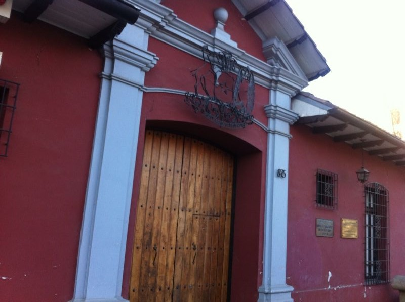 Casa de la Independencia This is a photo of a national monument in Chile: 144